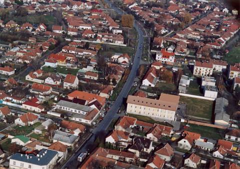 Kiskunmajsa, Hungary, aerialphotography